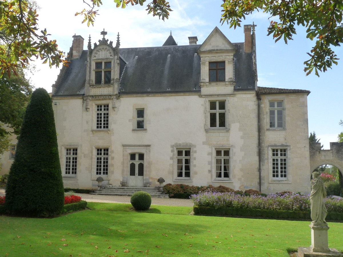 Château de Beaulon, St-Dizant-du-Gua, Charente-Maritime, France